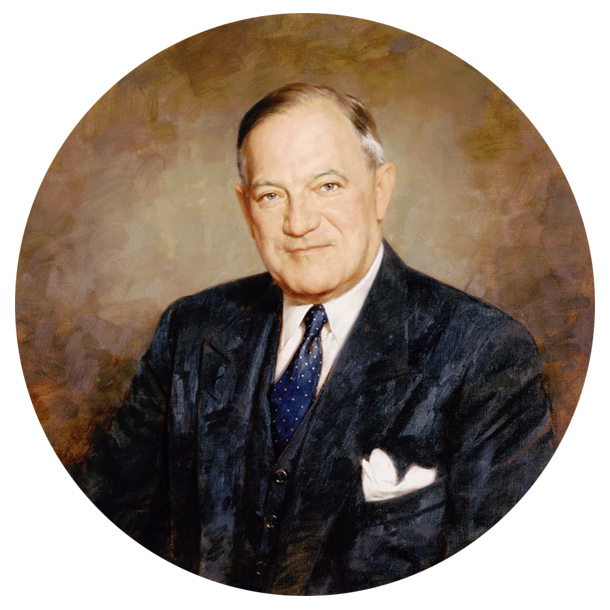 Robert F. Wagner, U.S. Senate portrait